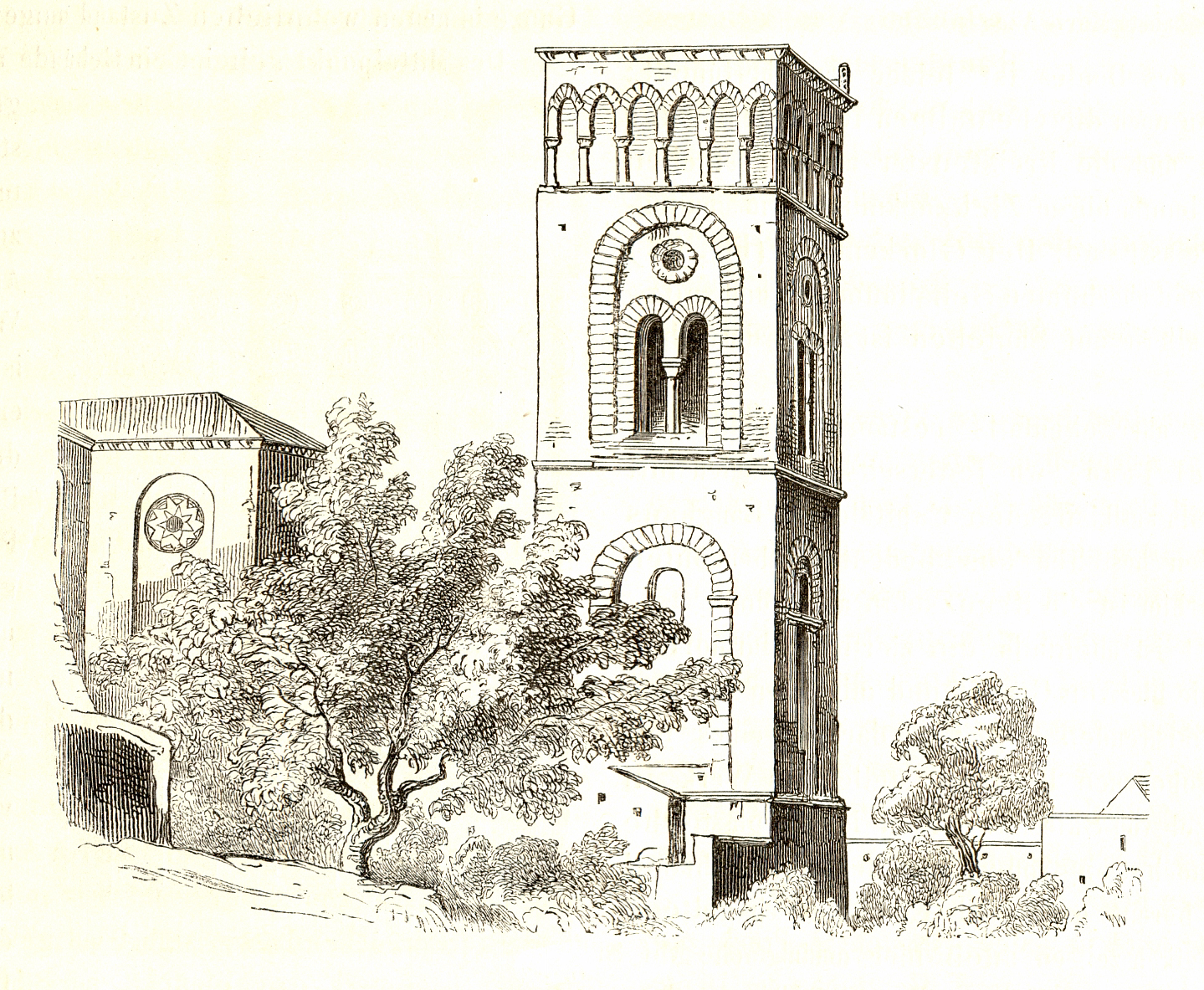 Holzschnitt aus den Mittheilungen der kaiserl. königl. Central-Commission zur Erforschung und Erhaltung der Baudenkmale Band 5, 1860. Beitrag von Wilhelm Lübke mit dem Titel: „Reisenotizen über die mittelalterlichen Kunstwerke in Italien“, 1858/1859, gemeinsam mit Karl Schnaase Druck: k. k. Hof- und Staatsdruckerei Zuordnung der Zeichnungen entsprechend dem Dateinamen